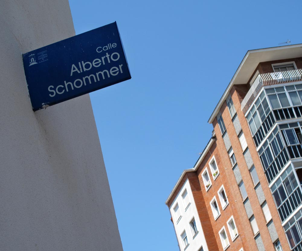 Cartel de la calle en honor del fotógrafo vitoriano Alberto Schommer, en su ciudad natal.